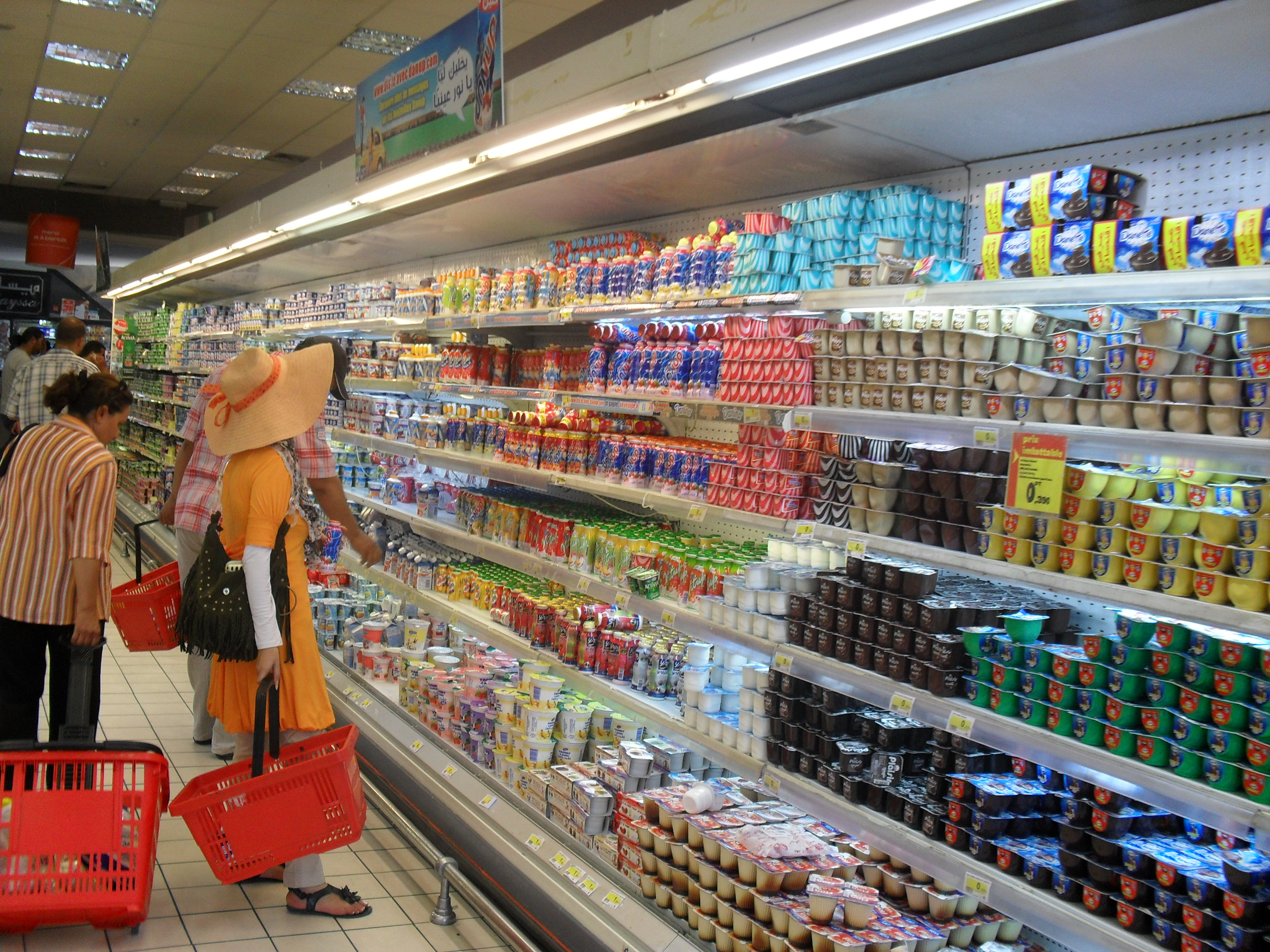 [Houda Trabelsi] The Tunisian government says it has reserves of essential goods to last until March 2012. تقول الحكومة التونسية إن لديها مخزونا من السلع الأساسية يكفي حتى مارس 2012 Le gouvernement tunisien indique disposer de réserves de produits de base jusqu'à au moins mars 2012.